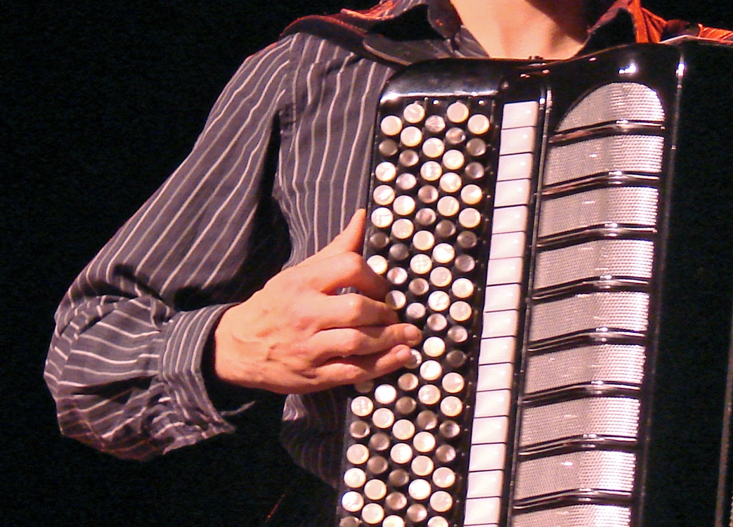 Position correcte de la main droite sur un accordéon chromatique, pour Wikibooks.